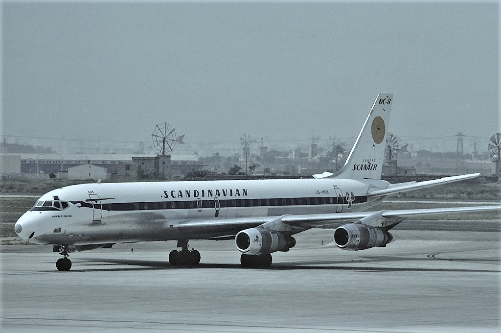 Scanair Douglas DC-8-55 LN-MOH at Palma de Mallorca Airport